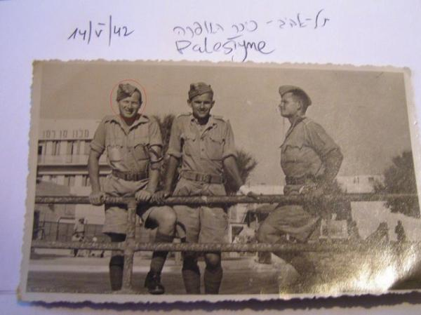 חייל יהודי שהגיע עם צבא פולין לתל אביב ב 1942